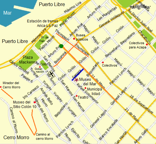 Mapa ubicación del Museo del Mar de Arica